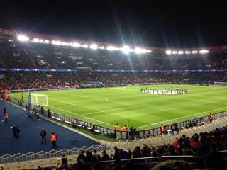 PSG - RSC Anderlecht : rencontre Ligue des champions au Parc des Princes le 31/10/2017.